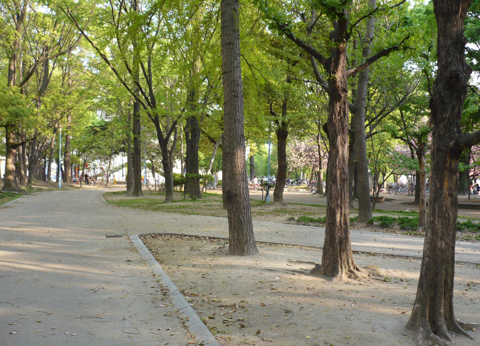 堀城推定地